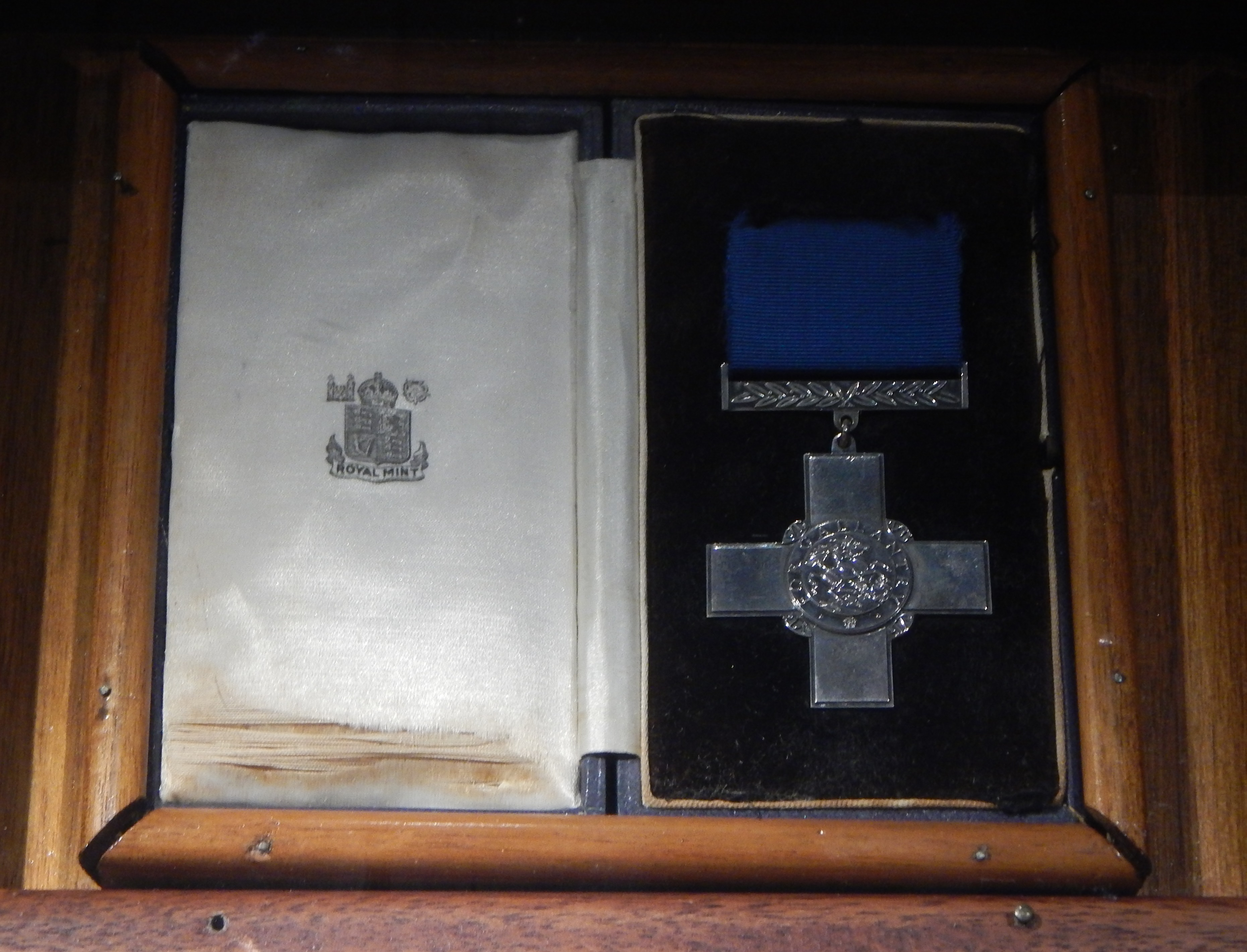 Croix de Georges reçue par le gouverneur de Malte le 15 avril 1942. Celle-ci figure sur le drapeau.du pays et est exposée au fort Saint-Elme à La Valette.